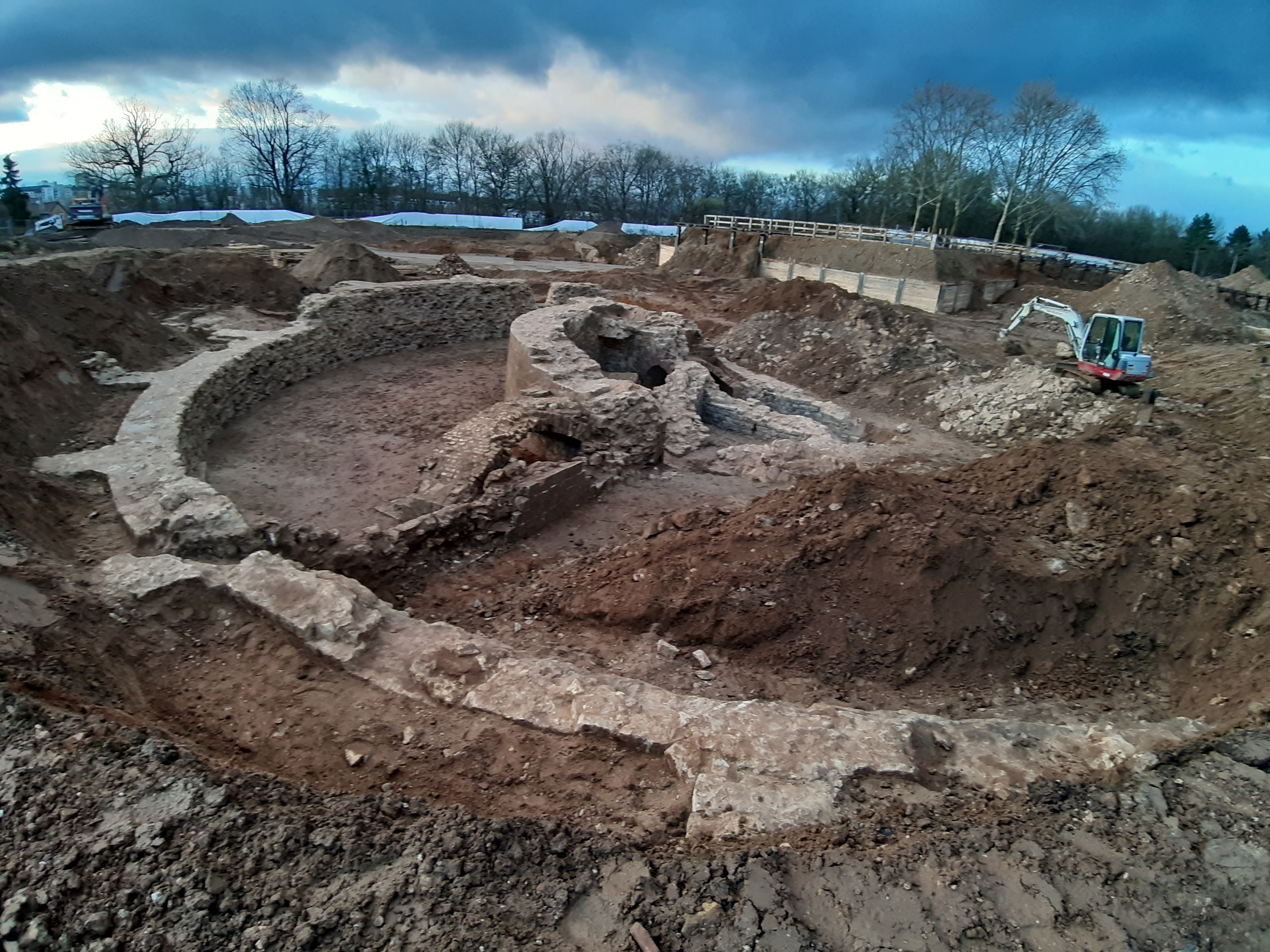 Blick auf die Ausgrabungen des Fort Hartenberg in Mainz aus Osten in Richtung Westen, links vom Bildrand befindet sich die Bushaltestelle "Hartenbergpark".